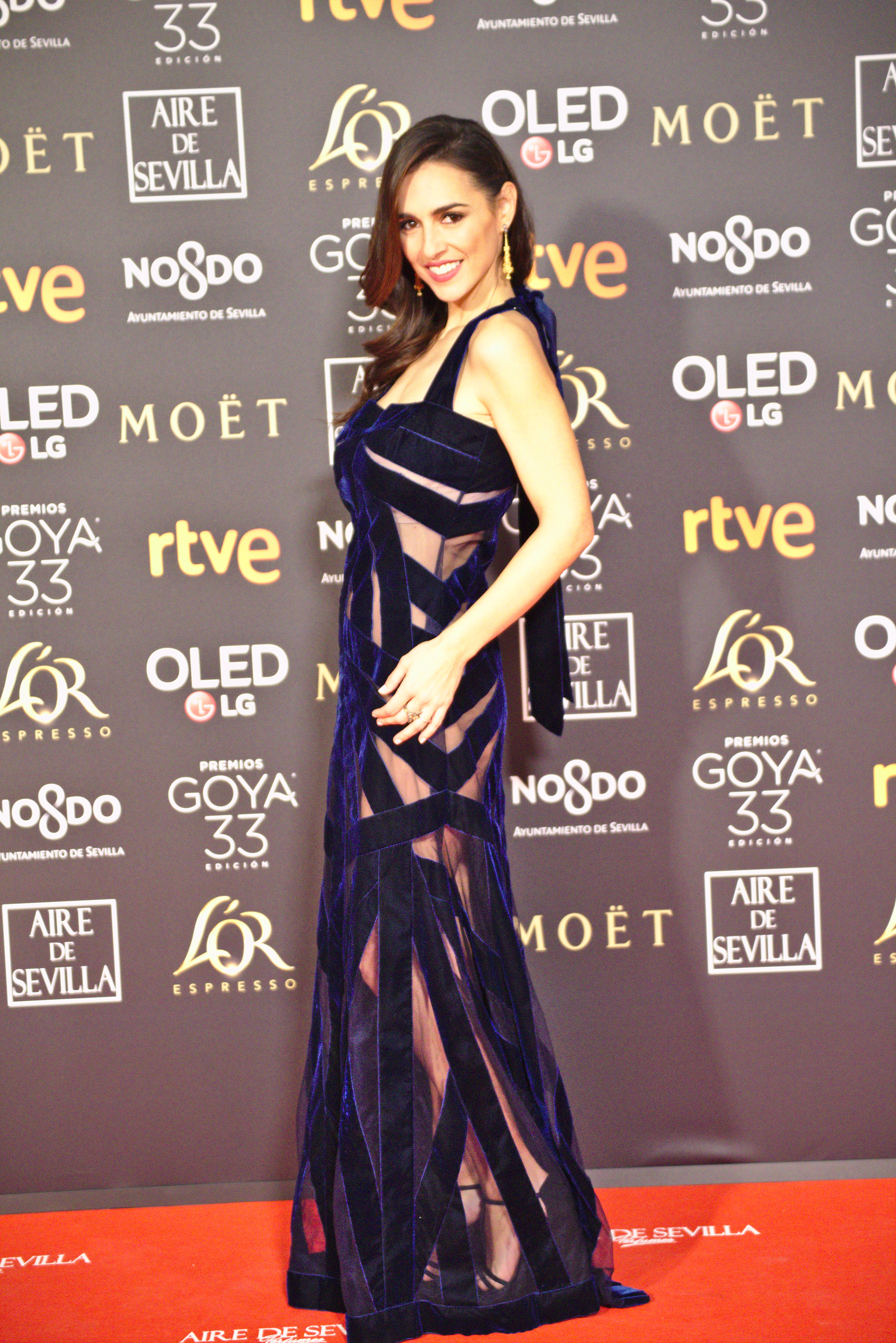 Cristina Brondo en la alfombra roja de los Premios Goya celebrados en Sevilla en Febrero 2019